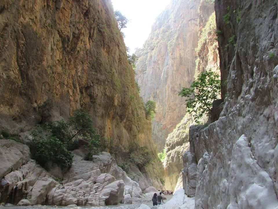 Saklıkent Kanyonu'ndan bir görünüm.